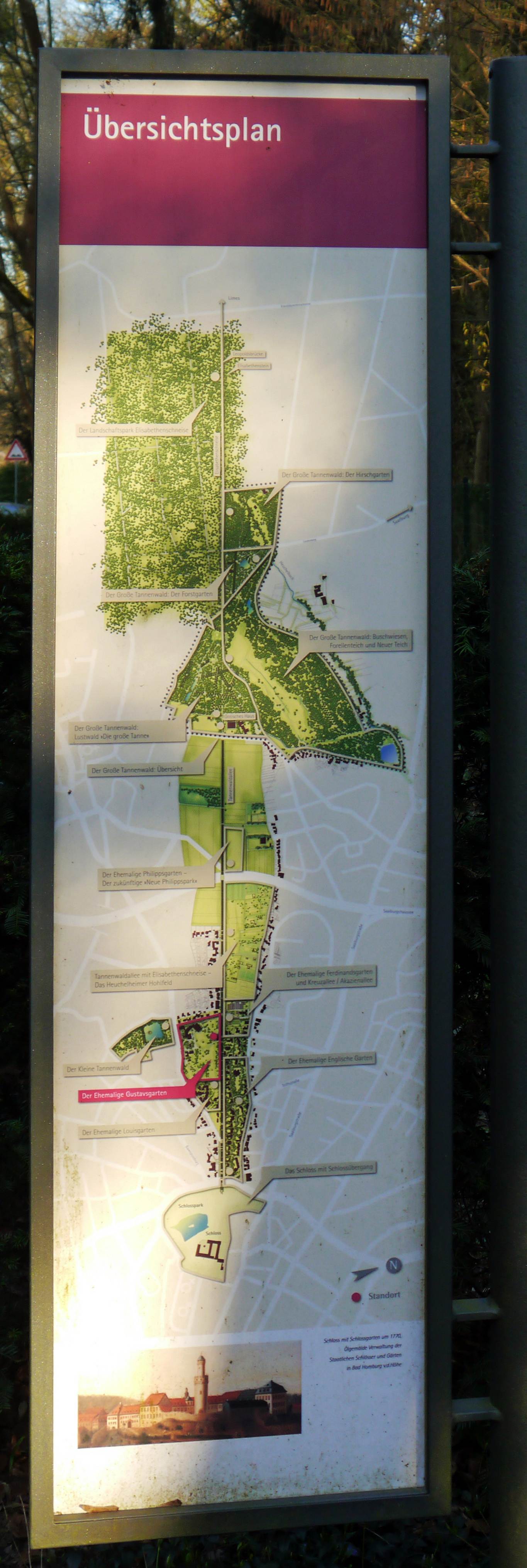 Infotafel zur historischen Tannenwaldallee, 2014 an der Tannenwaldallee in Bad Homburg.